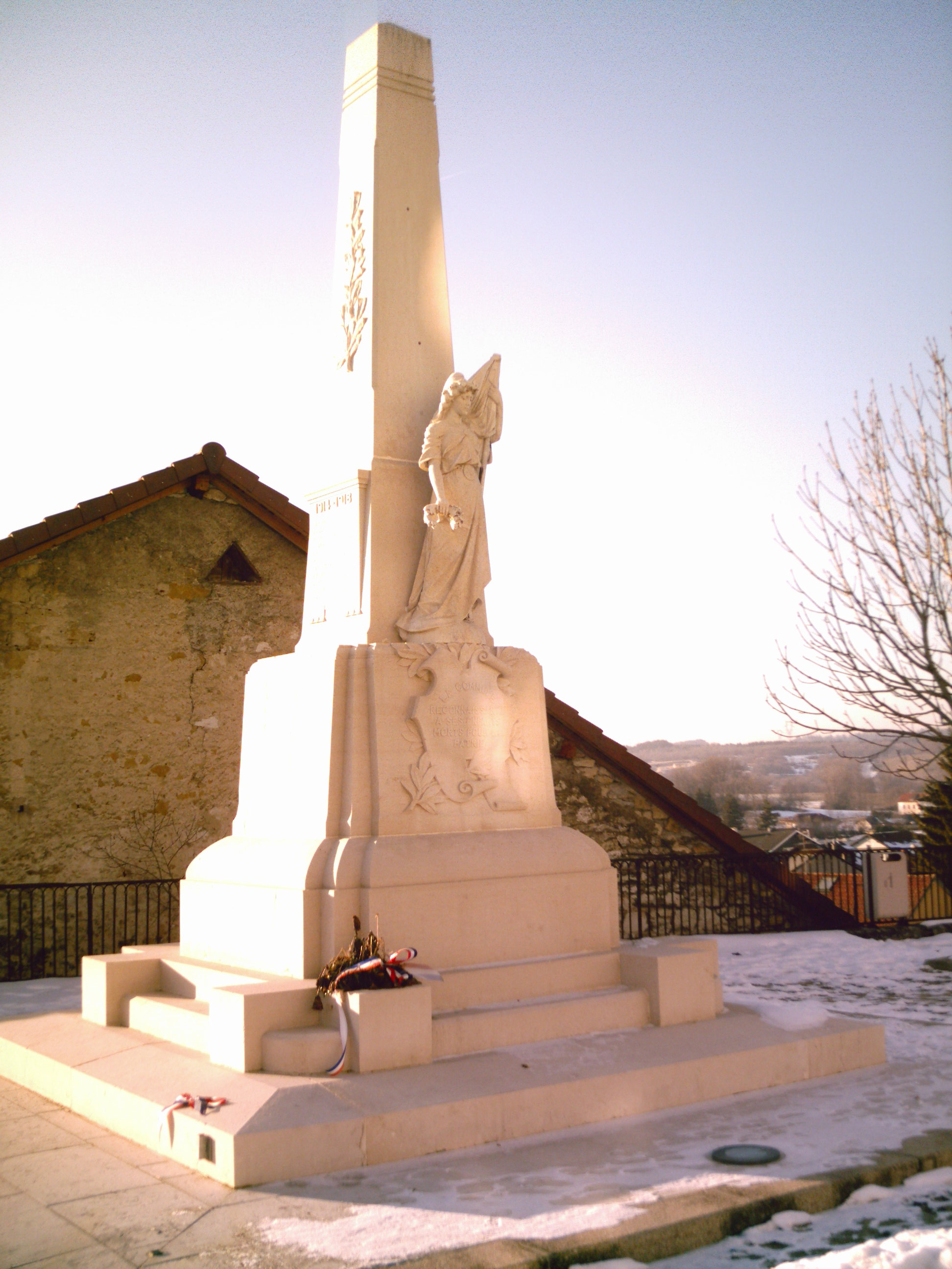 Un monument aux morts d'Hauteville-Lompnès